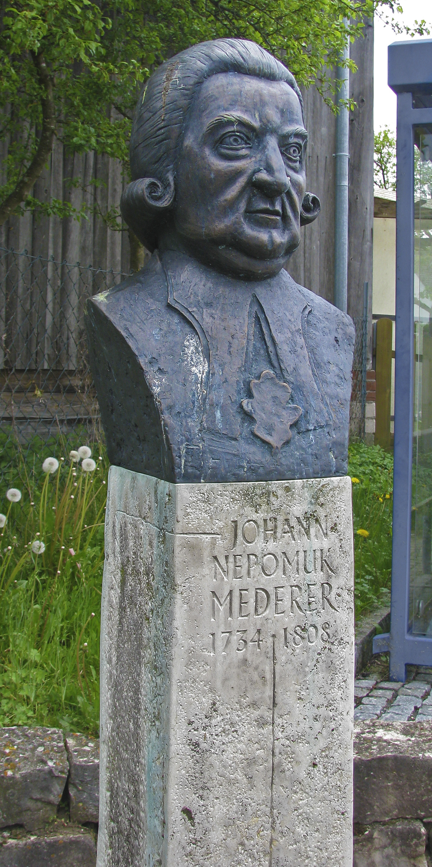 Stöckelsberg, Ortsteil der Gemeinde Berg bei Neumarkt in der Oberpfalz, Johann Nepomuk Mederer-Denkmal